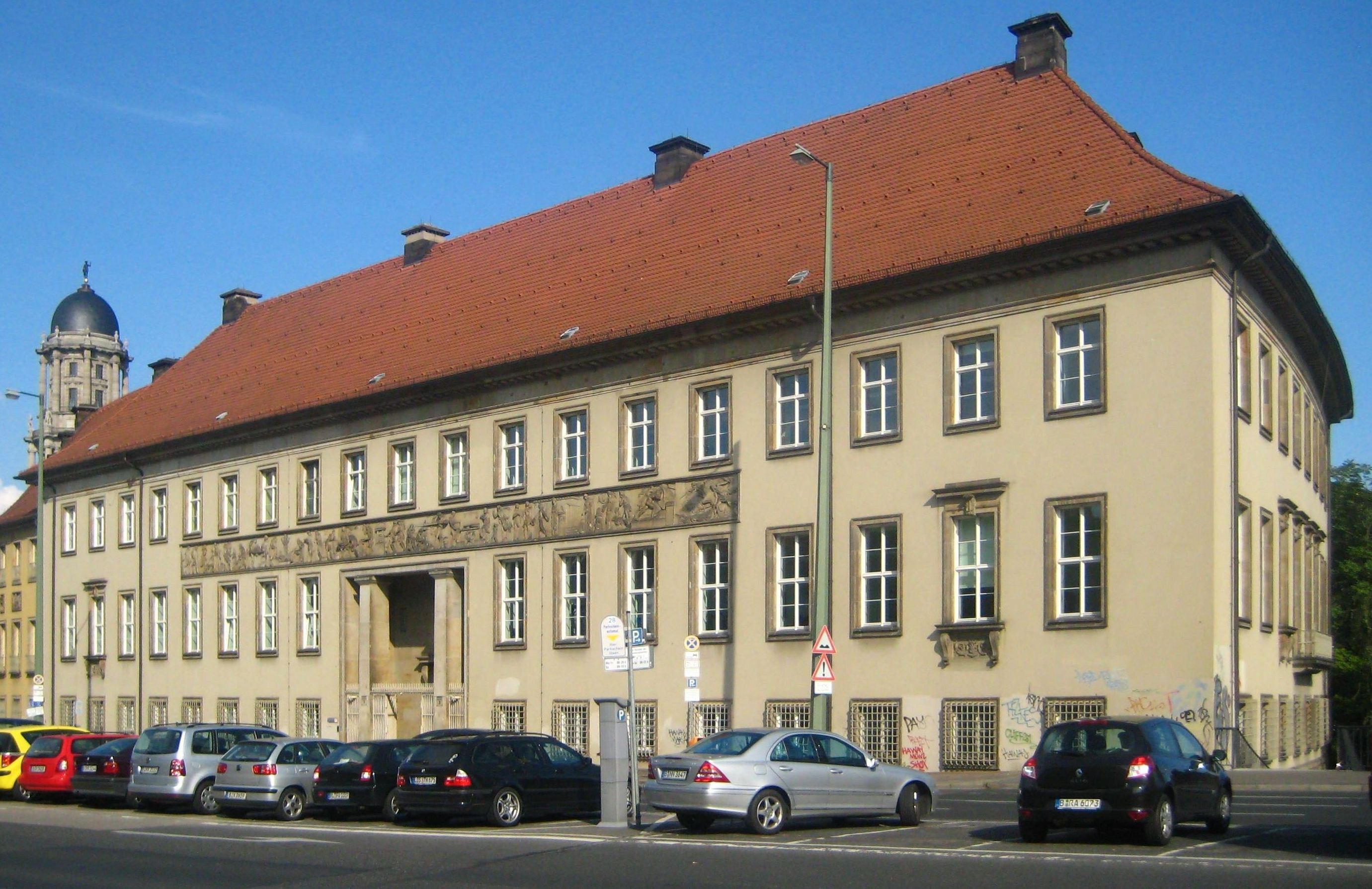 Hauptgebäude der Münze am Molkenmarkt 1-3 in Berlin-Mitte. Der große Komplex der neuen Reichsmünze zwischen Molkenmarkt und Rolandufer entstand 1936-1942 nach einem Entwurf der Architekten Fritz Keibel und Arthur Reck. Es handelte sich um einen der größten Einzelbauten der Nationalsozialisten in Berlin. Das Hauptgebäude für die Verwaltung an Mühlendamm und Rolandufer, ein anschließender Kopfbau für Wohnungen und das versetzte und in den Komplex integrierte barocke Palais Schwerin umschließen einen V-förmigen Innenhof, in dem sich das Fabrikgebäude befindet. Die Fassade am Mühlendamm ist als Putzbau schlicht gehalten. Eine Wandöffnung mit eingestellten Stützen dient als Portal. Der Wandschmuck besteht aus einer Kopie des bedeutenden Münzfrieses von Friedrich Gilly und Johann Gottfried Schadow von der alten Münze am Werderschen Markt. In der DDR-Zeit wurde der Komplex als Prägestätte, von der Staatlichen Kunstkommission und vom Kulturministerium genutzt. Nach 1990 wurde der Komplex weiter von der Staatlichen Münze Berlin verwendet, bis diese 2005 nach Reinickendorf umzog. Der gesamte Komplex steht als Baudenkmal unter Denkmalschutz.